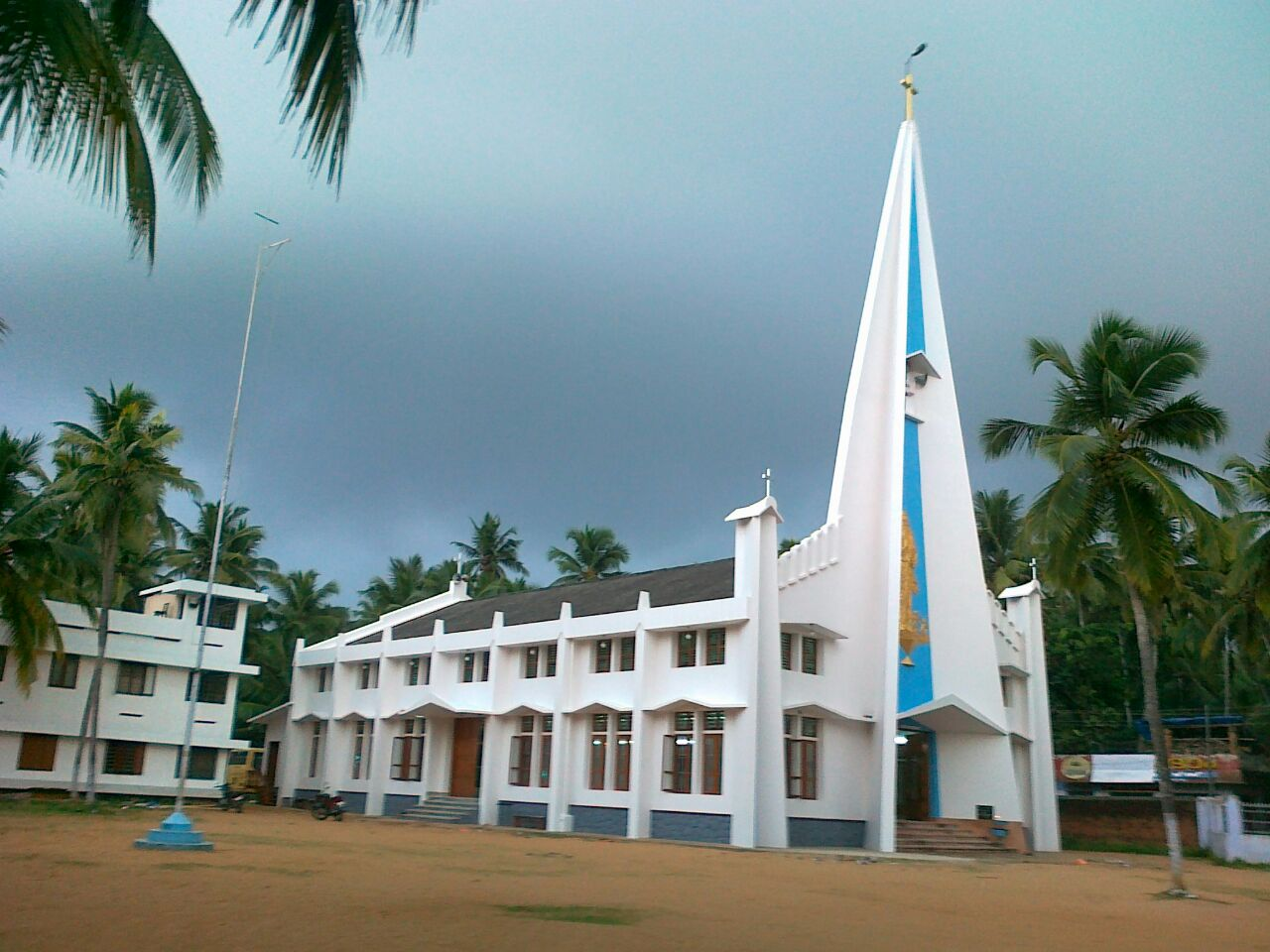 സ്വർഗ്ഗാരോപിതമാതാ ദൈവാലയം വ്ളാത്താങ്കര